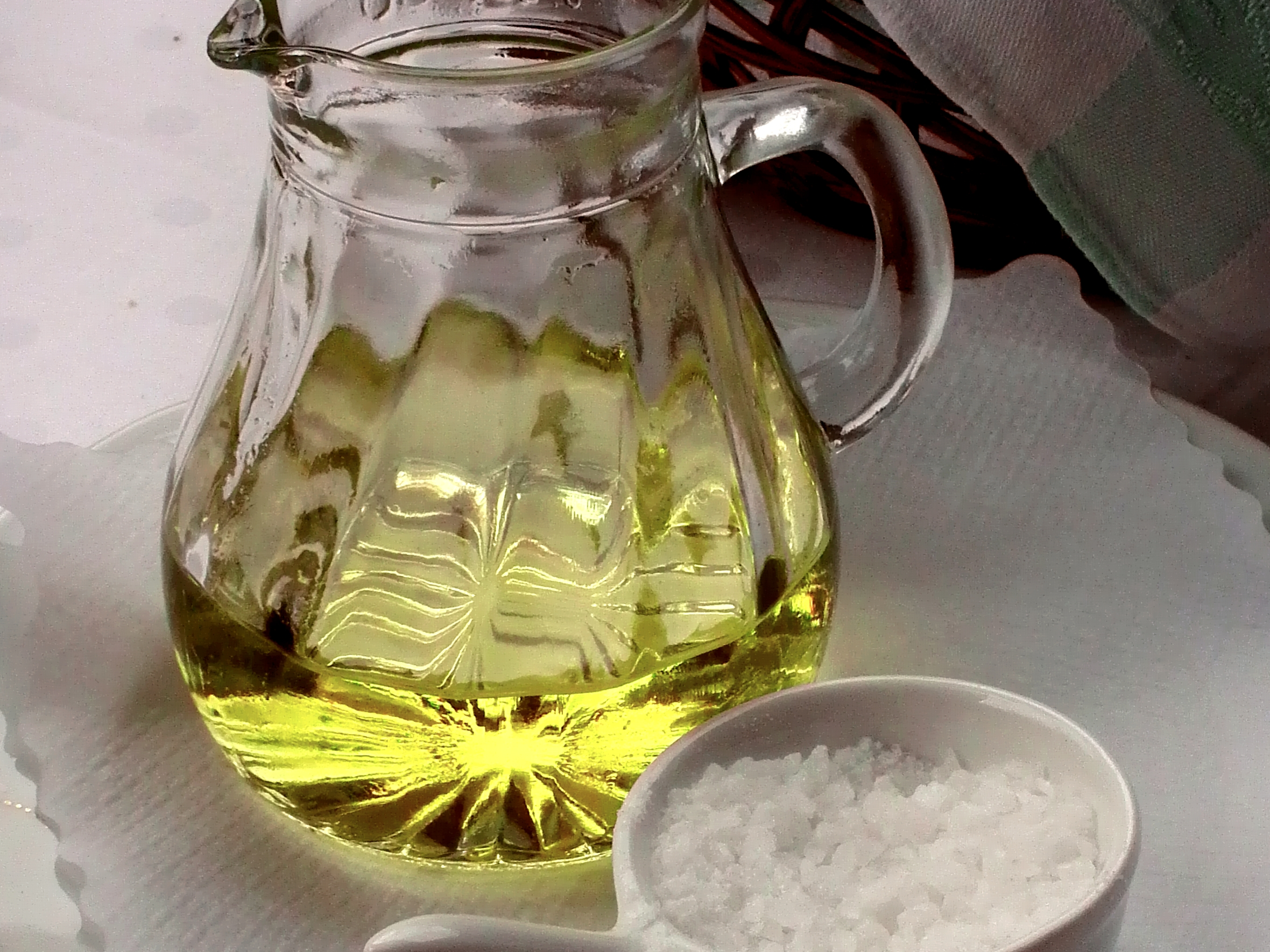 Olivenöl und grobes Salz